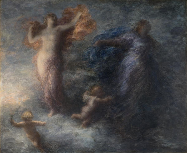 Картина французского художника Анри Фантен-Латура "Рассвет и ночь"